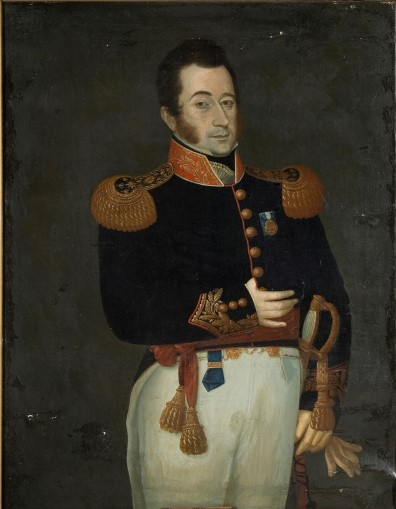 Retrato del General Ignacio Álvarez Thomas, hecho por José Gil de Castro en Santiago de Chile en 1825. Actualmente se encuentra en el Museo Histórico Nacional. Fuente